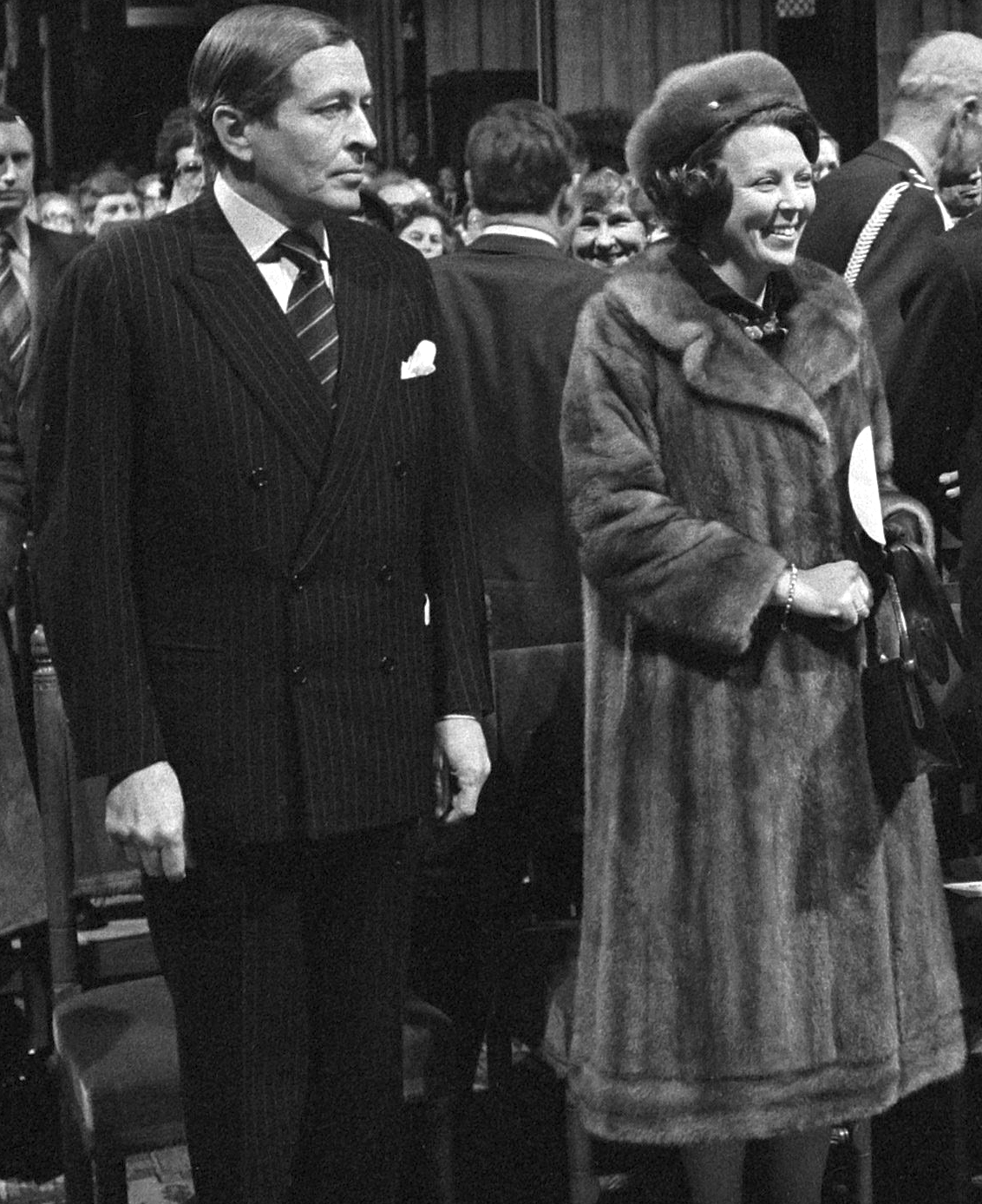 Collectie / Archief : Fotocollectie Anefo Reportage / Serie : [ onbekend ] Beschrijving : Herdenkingsbijeenkomst Unie van Utrecht in Domkerk te Utrecht; in de Domkerk v.l.n.r. Claus, Beatrix, Vondeling Bernhard, HM, Thurlings Datum : 23 januari 1979 Locatie : Utrecht Trefwoorden : bijeenkomsten, herdenkingen Persoonsnaam : Beatrix, prinses, Bernhard (prins Nederland), Claus, prins, Margriet, prinses, Thurlin Vondeling Instellingsnaam : Domkerk Fotograaf : Suyk, Koen / Anefo Auteursrechthebbende : Nationaal Archief Materiaalsoort : Negatief (zwart/wit) Nummer archiefinventaris : bekijk toegang 2.24.01.05 Bestanddeelnummer : 930-0851